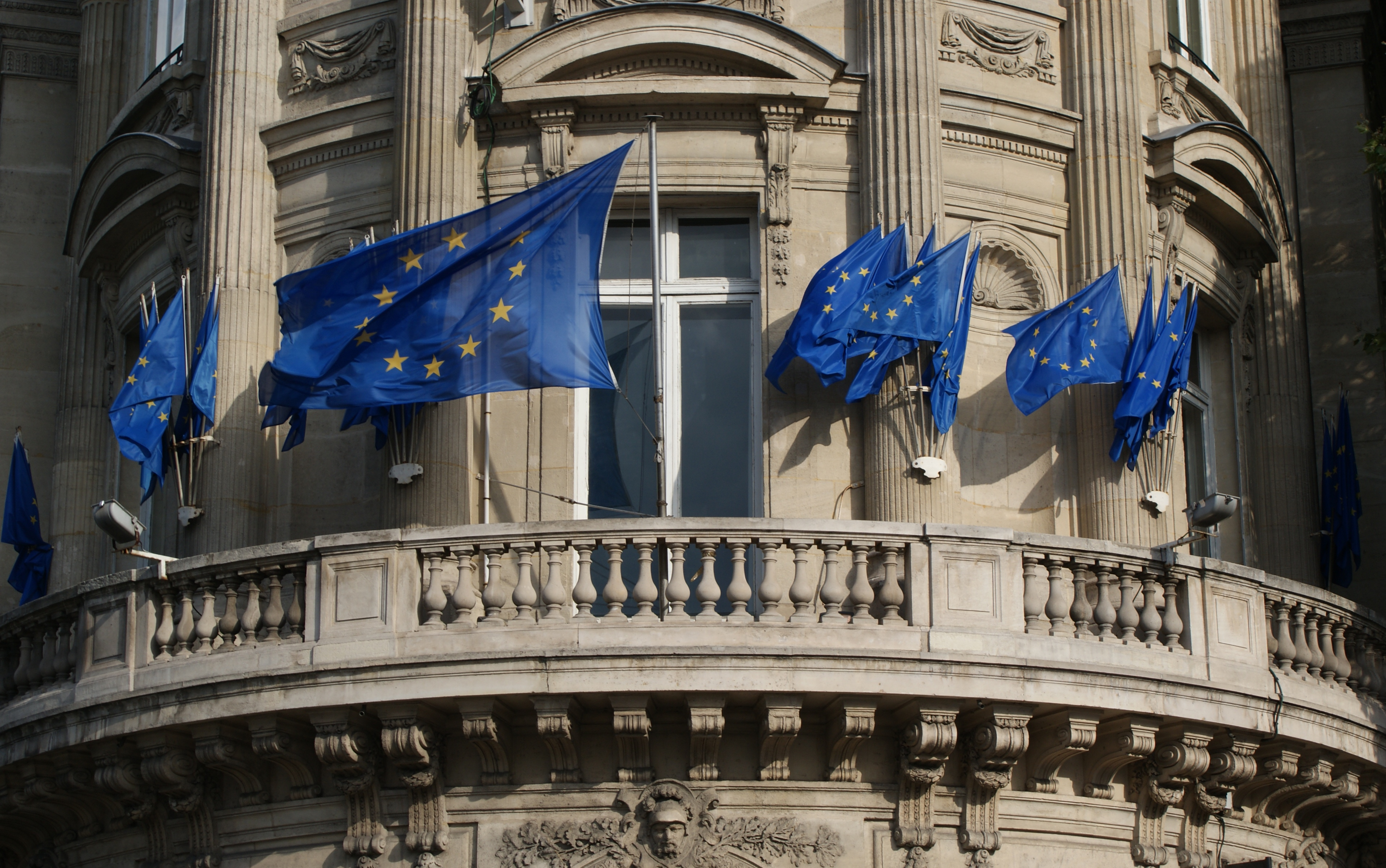 Représentation de la Commission européenne en France, 288 Boulevard Saint-Germain